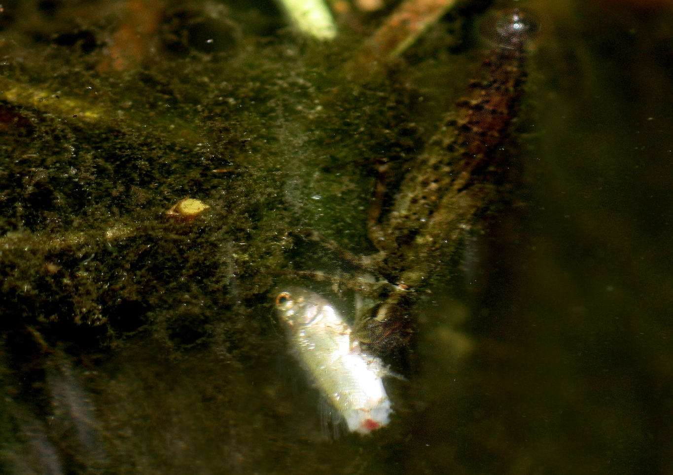 Libellenlarve frisst an einem Fisch